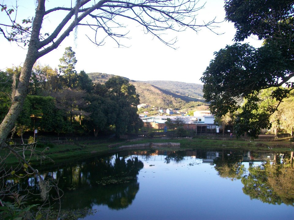 En Capacho Independencia Estado Tachira, el pueblo mas bello de los andes venezolanos.